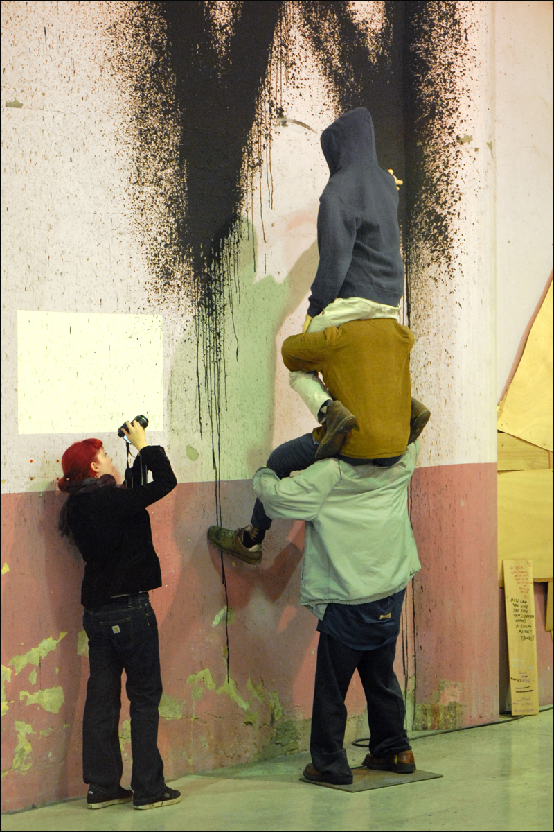 Installation 2009 oeuvres de Barry McGee (1966, San Francisco) La Sucrière Xe Biennale de Lyon "Le spectacle du quotidien" Commissaire : Hou Hanru